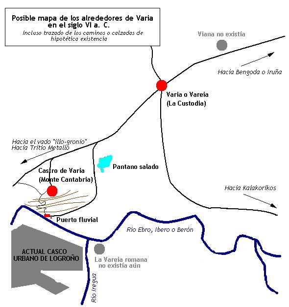 Posible mapa de los alrededores de Varia en el siglo VI a. C.